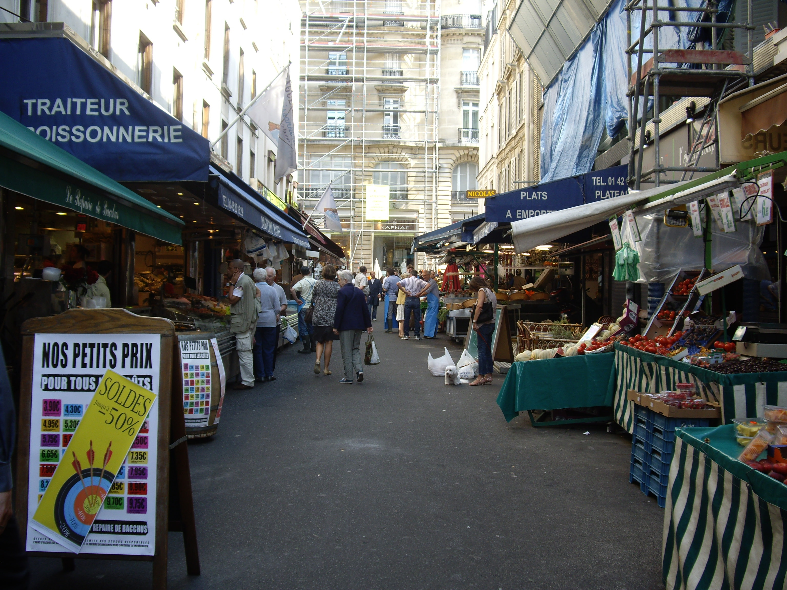 Marché Poncelet-Bayen, rue Bayen, Paris 17e. Vu depuis la place Boulnois. Au fond, la rue Poncelet.